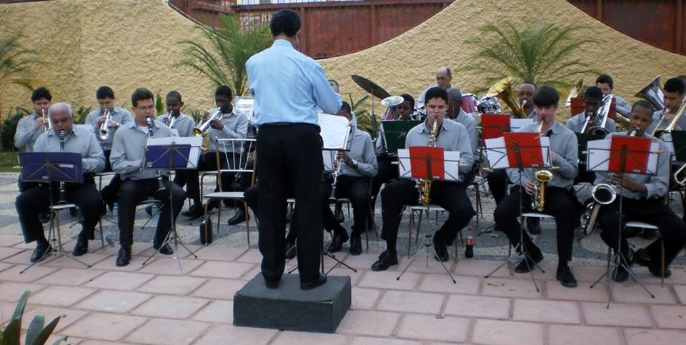 Aniversário da Sociedade Musical Carlos Gomes, em 2011.